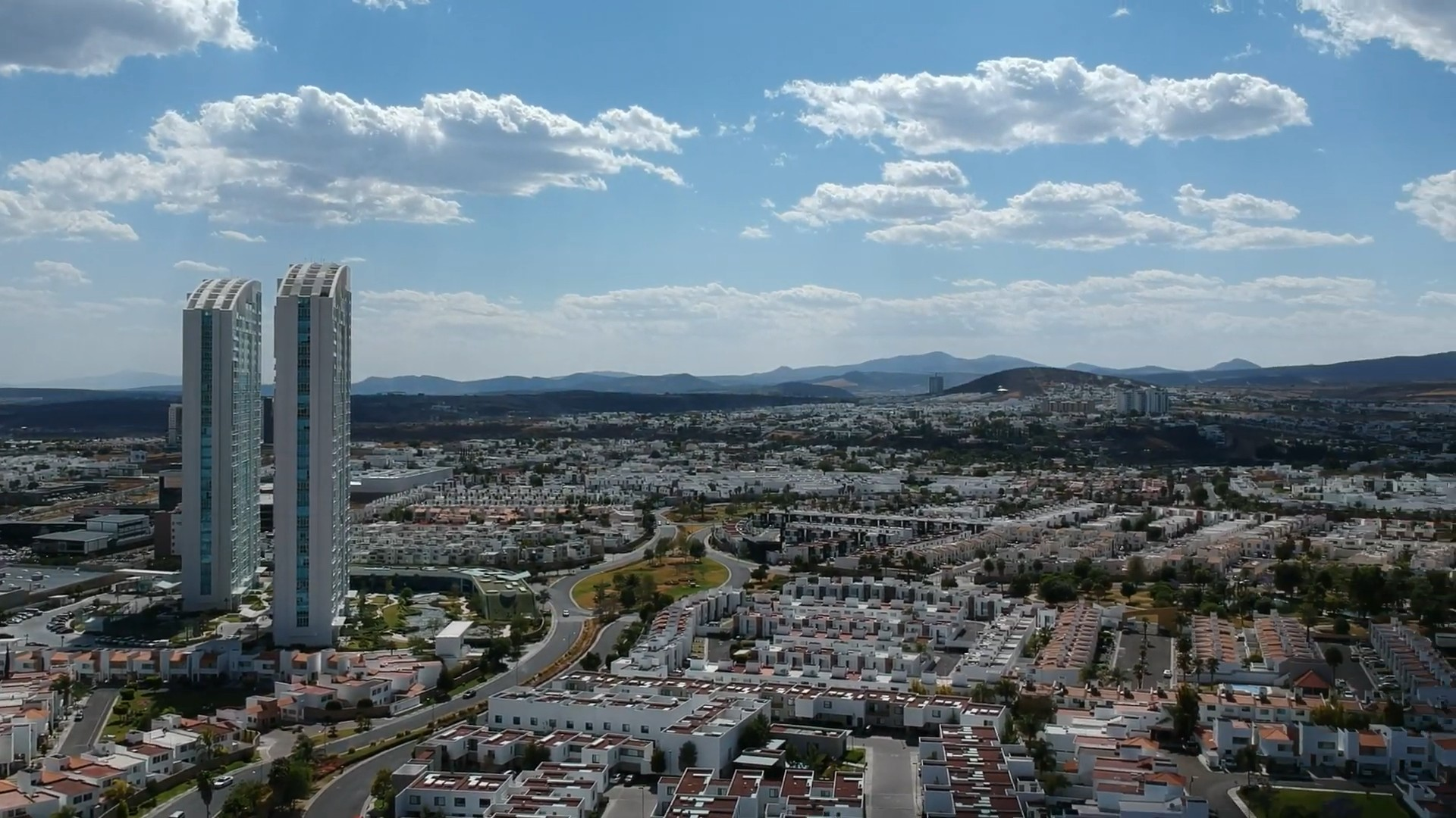 Vista aérea de Juriquilla, Santiago de Querétaro, México